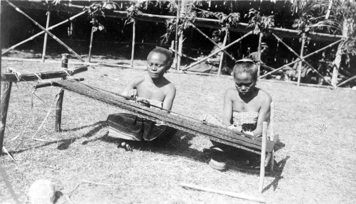 Repronegatief. Het ikatten van de kettingdraadbundels, waarbij het patroon niet vooraf op de witte draden wordt aangegeven, Timor